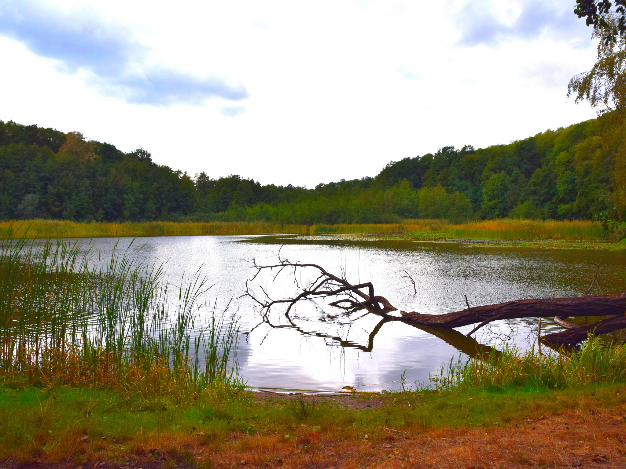 Fauler See, Frankfurt (Oder)-Güldendorf